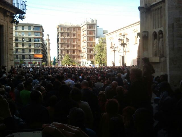 Concentración del 3 de mayo de 2013 en la Plaza de la Virgen de Valencia para que se reabra la investigación del accidente de Metrovalencia de 2006